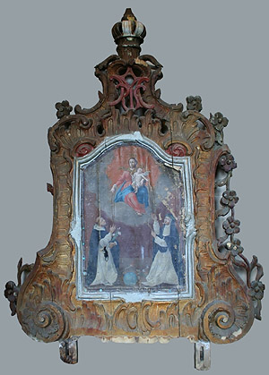 Богоматерь Ружанцовая с коленопреклоненными перед ней святыми Домиником и Розой Лимской. Они в соответствии с принятой иконографией представлены в черно-белой одежде доминиканцев